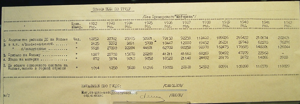 Страница из отчёта планово-экономического отдела "Дальстроя", 1943 г. Из экспозиции Магаданского областного краеведческого музея, 2010 г.